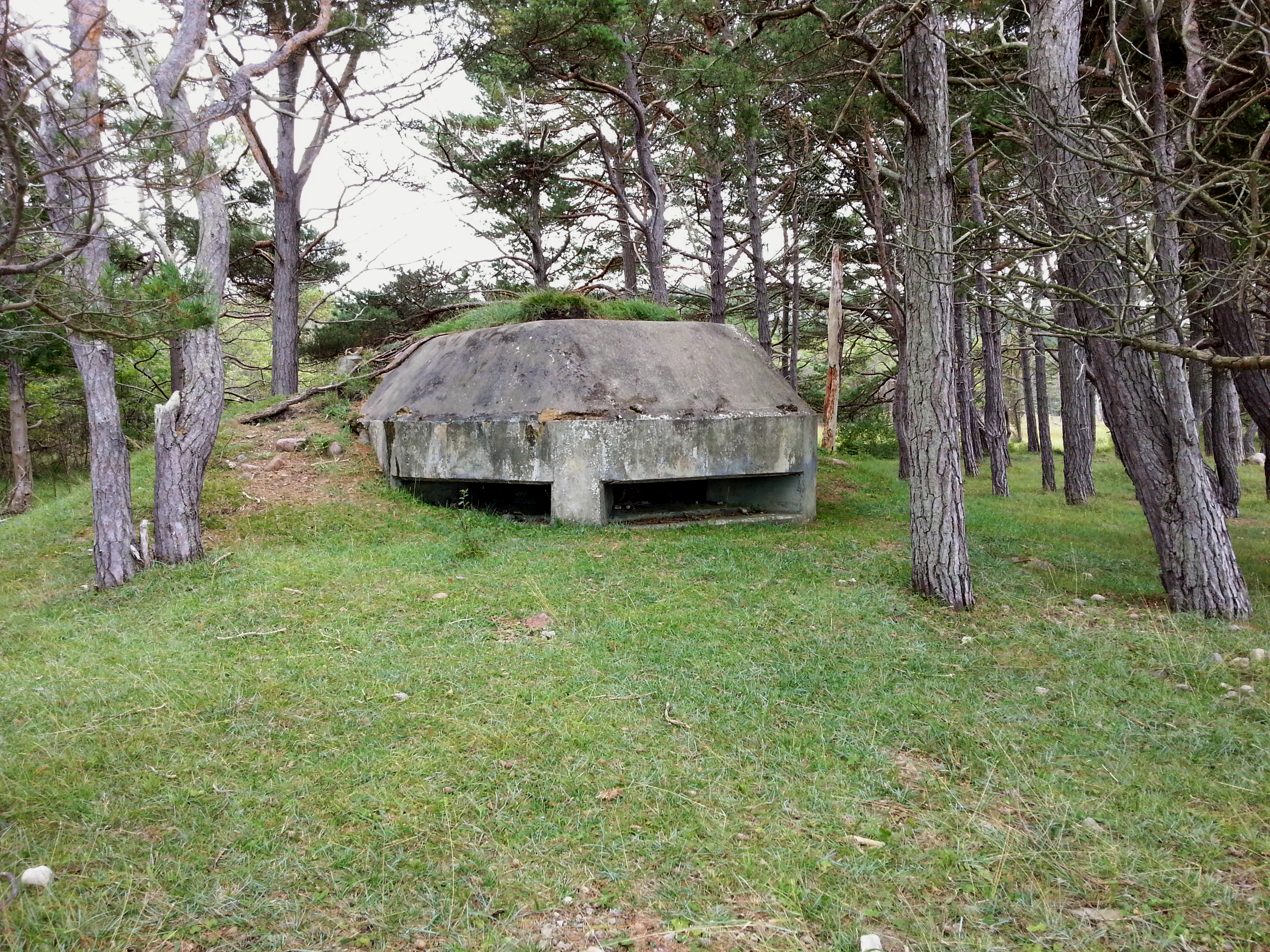 Stridsvärn, Ksp-bunker (Ksp-värn 35:43). Värn i betong 5,05x4,20 m (V-Ö) m med vall (N-S) bestående av sand och grus på var sida om ingången. Ingång från Ö med karm och port i järn. Skottgluggarna vätter mot havet i NNV, V, SSV. Skottgluggarna är igensatta med järnskivor. Konstruktionsdetaljer är ventiler med ventilgaller mot N och S, ventilationsrör i keramik på toppen vanligen med plomberat lock, krokar i varje hörn på toppen för att hålla fast kamouflagenät. Värnet är byggt 1939-1940. Se även denna länk.